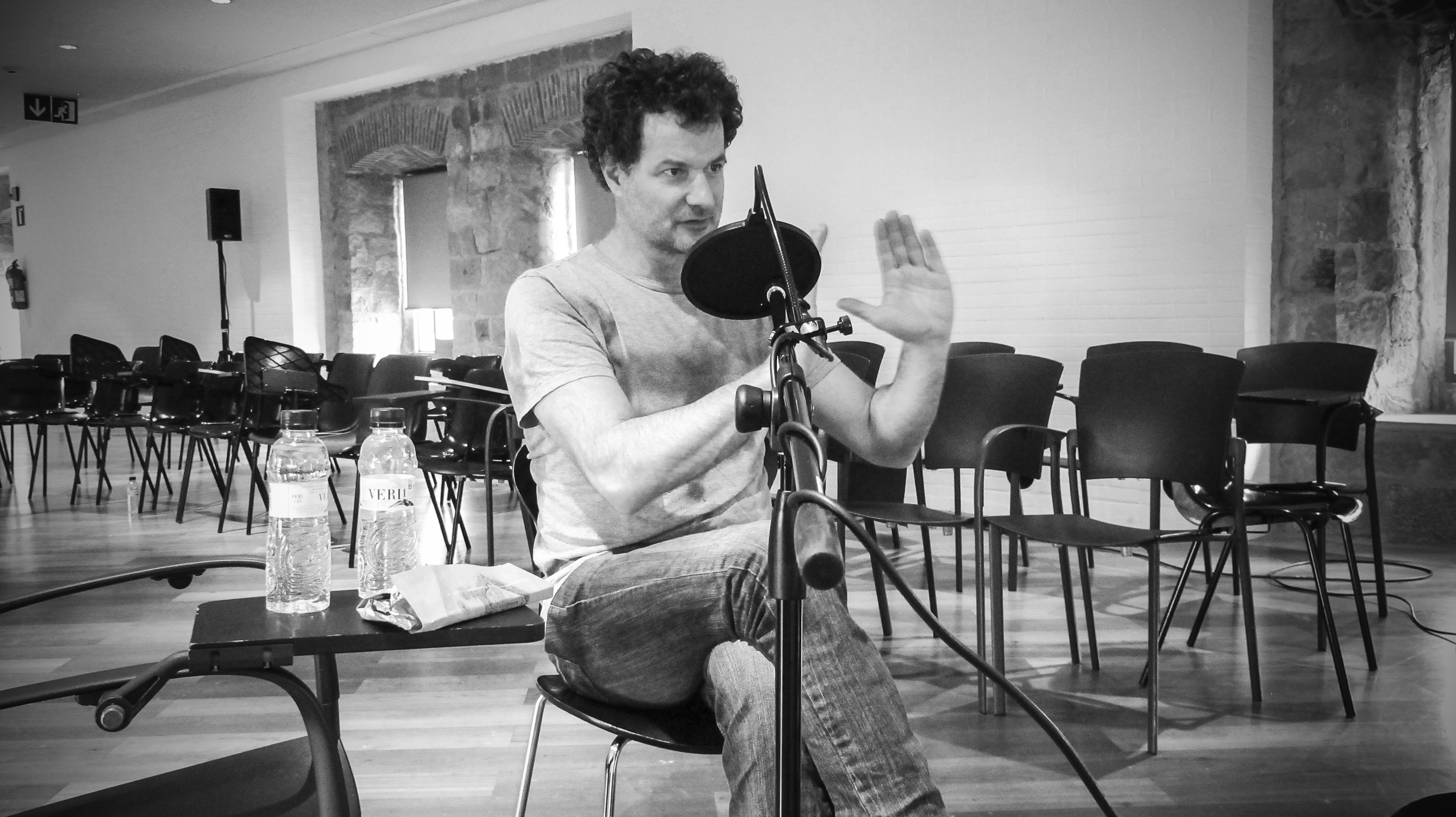 Conegut per la relació de la seva obra amb la noció de catàstrofe, Christoph Draeger és un dels autors inclosos en l’exposició ‘Punk. Els seus rastres en l’art contemporani’. Aprofitant la seva visita per assistir a la inauguració de l’exposició d’aquesta nit, Ràdio Web MACBA conversa amb ell sobre els seus interessos en la música, els mitjans de comunicació i la representació del caos. Foto: Rosa Cruz / MACBA, 2016.